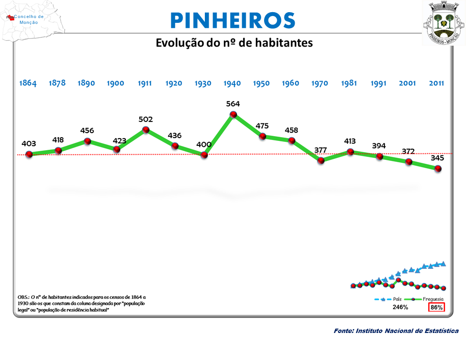 Censos 1864/2011